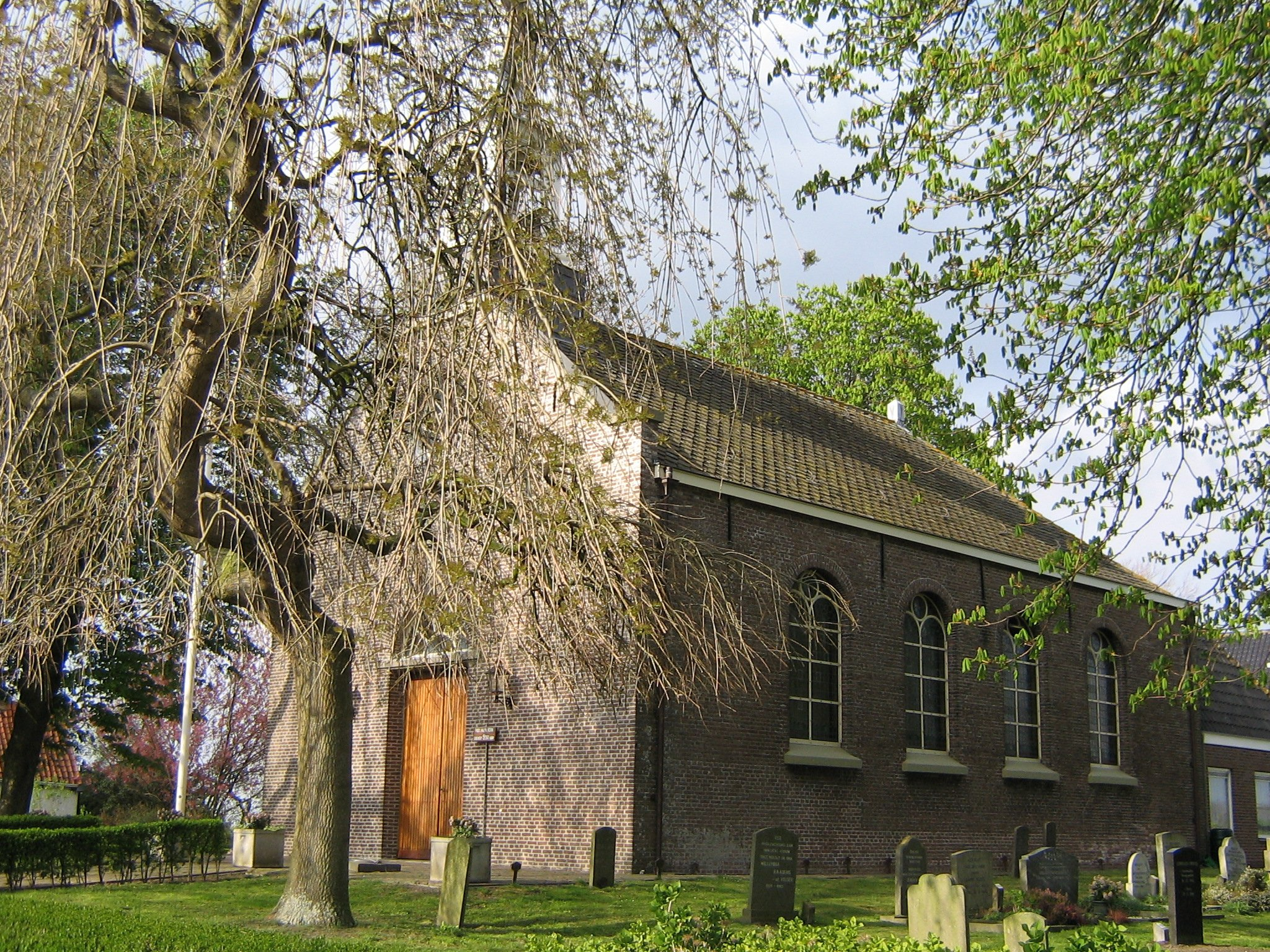 Ervurmde durpskerke van Klevers Hervormde dorpskerk van Kleverskerke, Zeeland Calvinist village church of Kleverskerke, Middelburg community, Netherlands